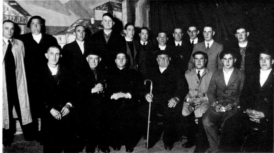 Txirritari Errenterian egin zioten omenaldia - Hernandorena eta beste euskaltzale